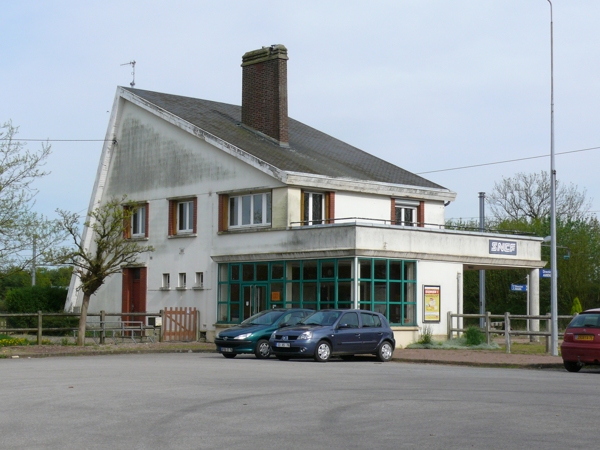 Bâtiment voyageurs (désaffecté) de la Gare de Montérolier-Buchy